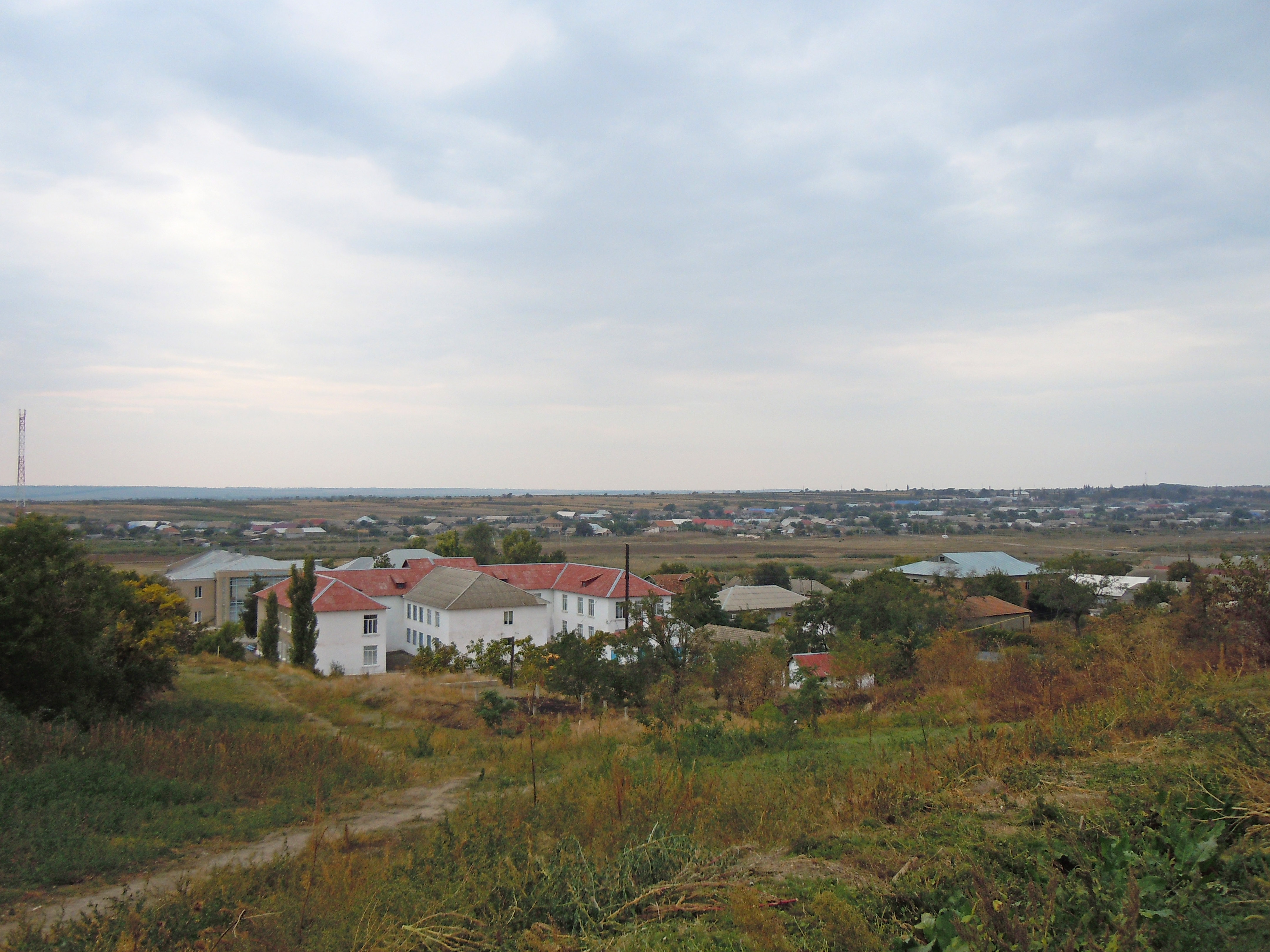 Вигляд на село Криничне з боку церкви